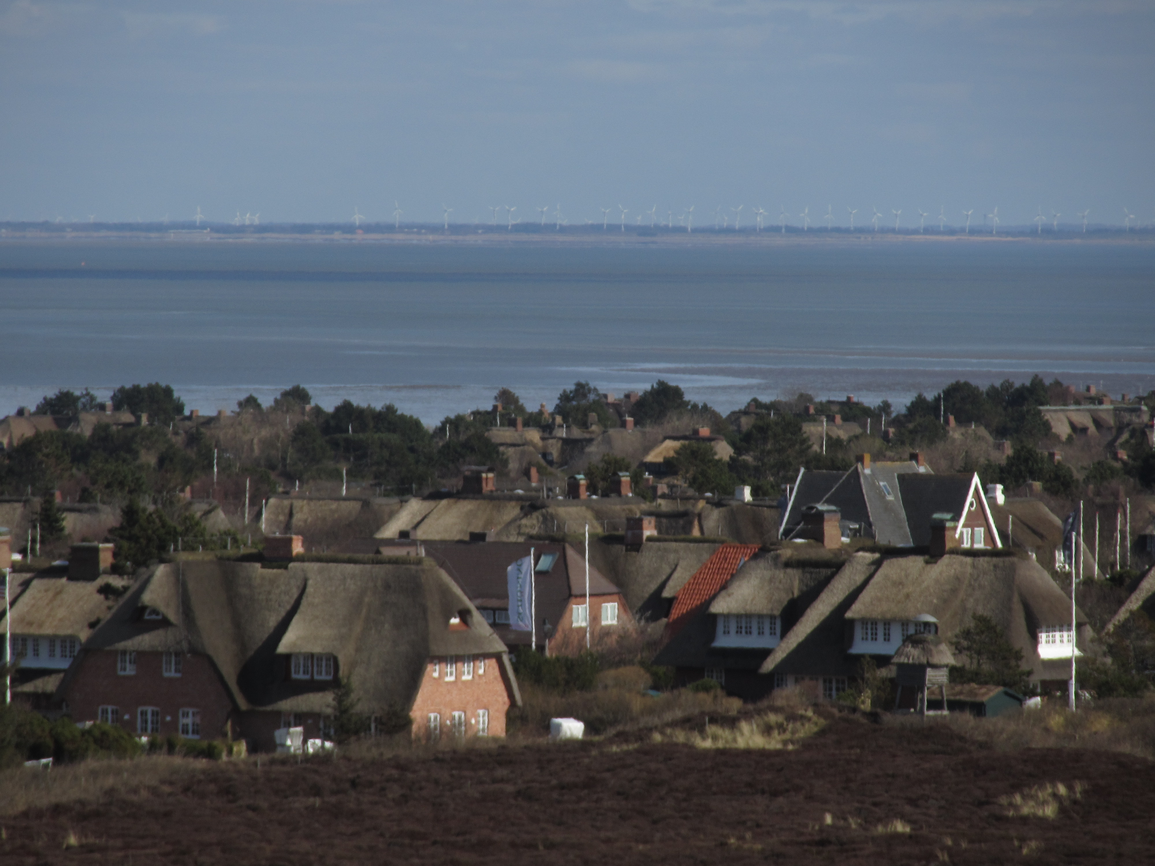 Sylt, Kampen, Blick von der Uwe Düne bis zum Dänischen Festland